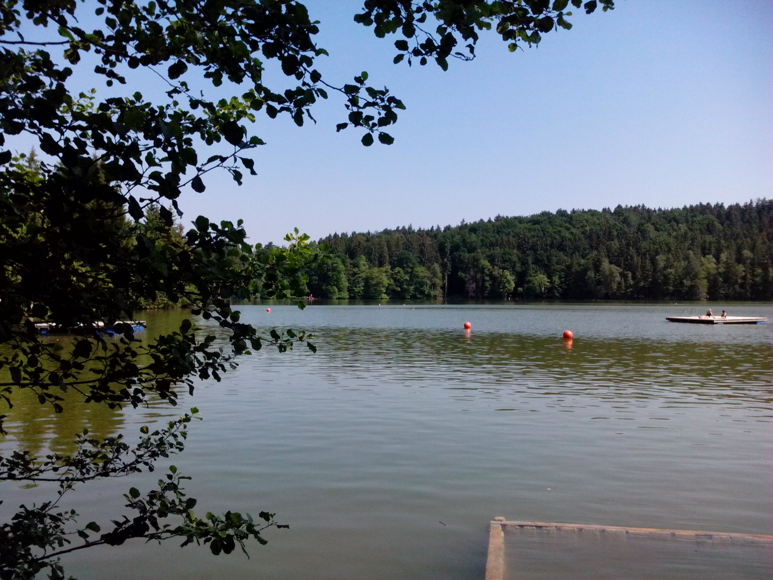 Aragonés: Tüttensee